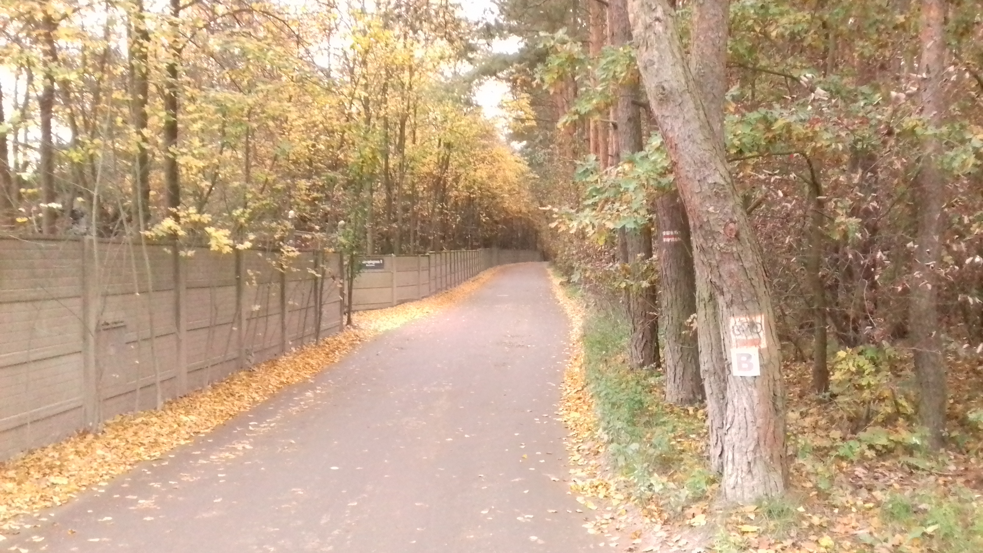 Wjazd do lasu w Borówcu, szlak turystyczny nr 186